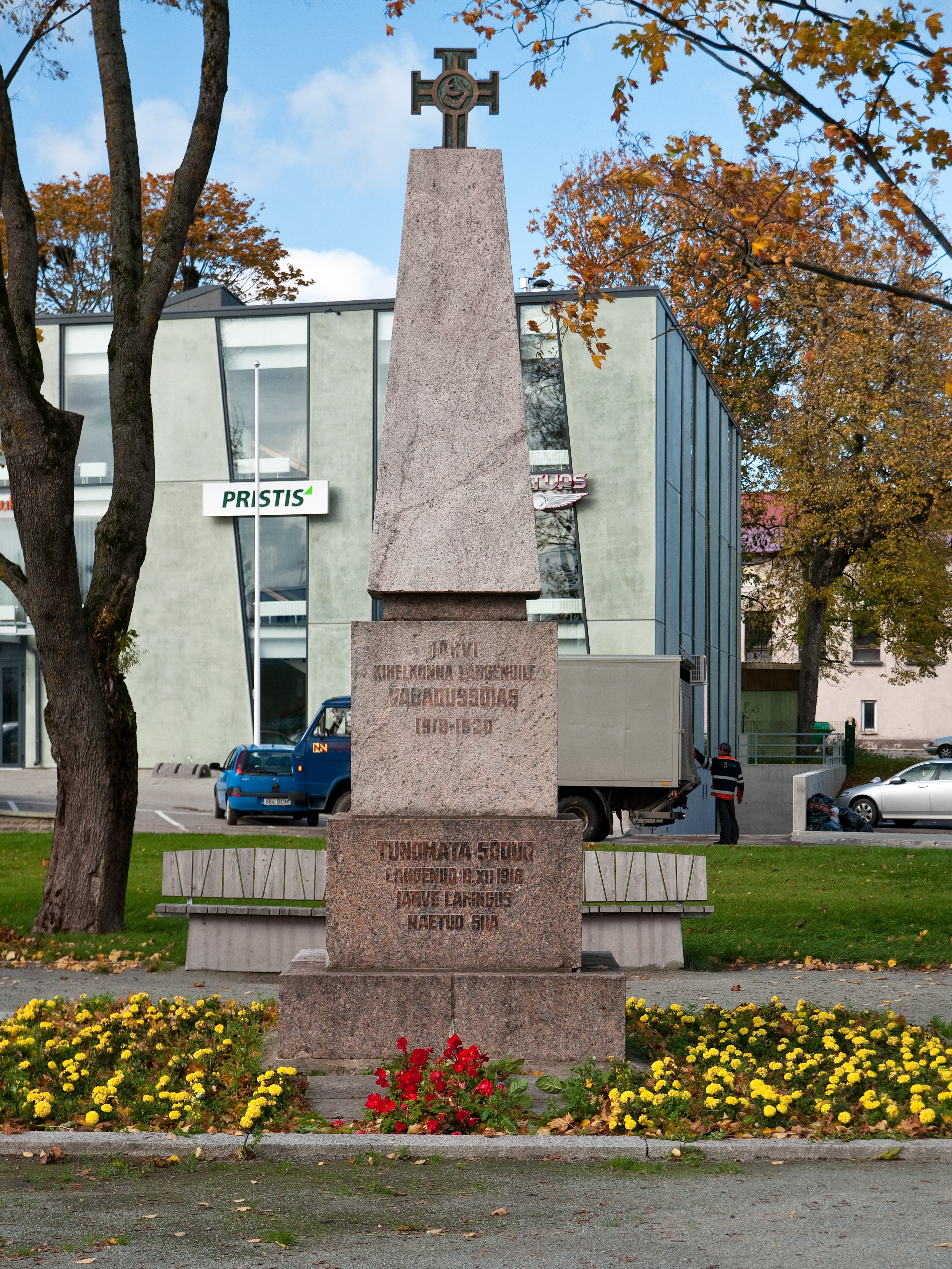 Ein Denkmall für die gefallenen Soldaten des estnischen Unabhängigkeitskrieges in den Jahren von 1918 bis 1920 in Jõhvi